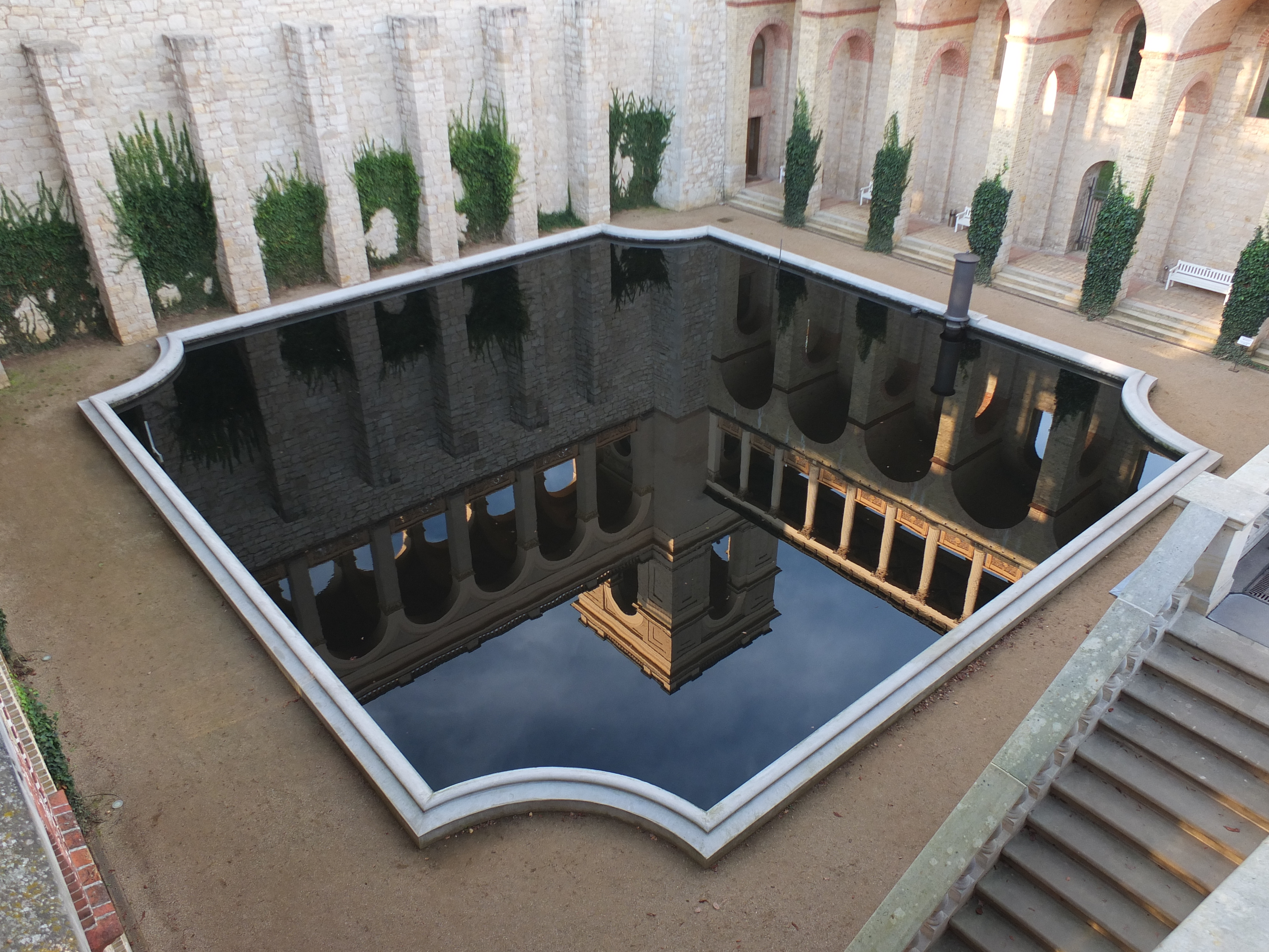 Spiegelung im Wasserbecken des Innenhofes des Schlosses Belvedere auf dem Pfingstberg in Potsdam